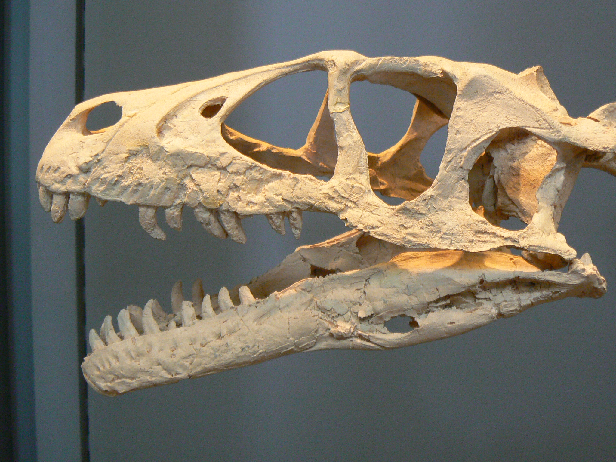 Dromaeosaurus